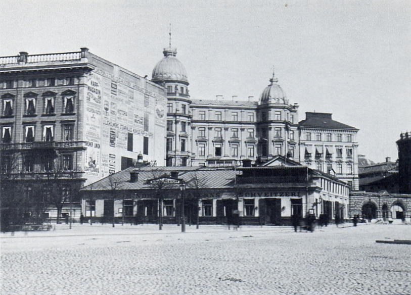 Hammerska ladan vid Kungsträdggården, Stockholm